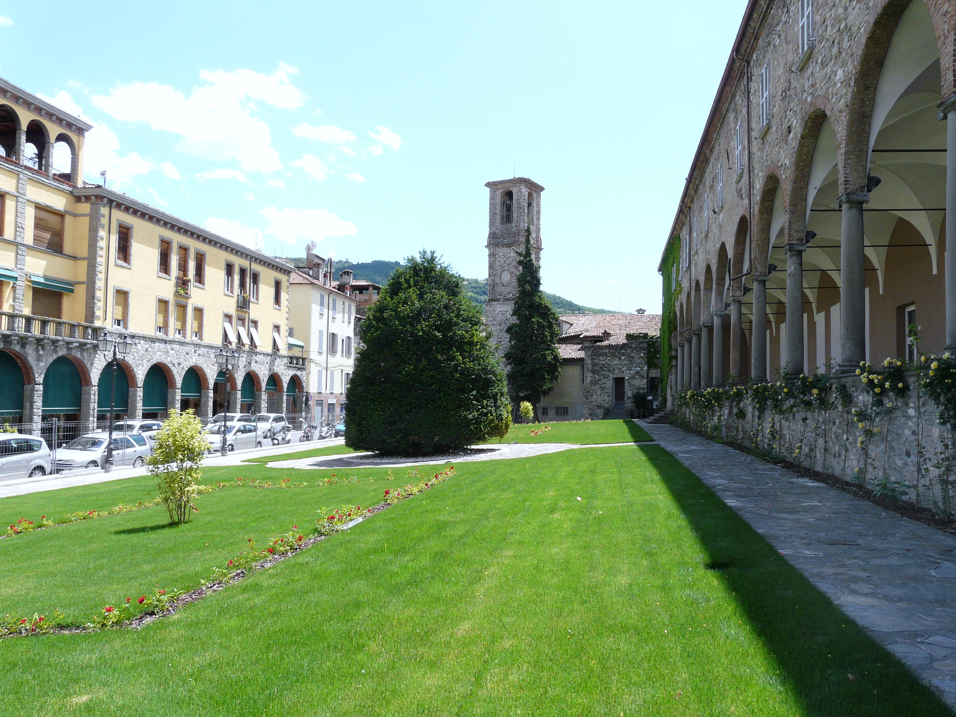 Immagini dell'abbazia di San Colombano di Bobbio, Emilia-Romagna, Italia